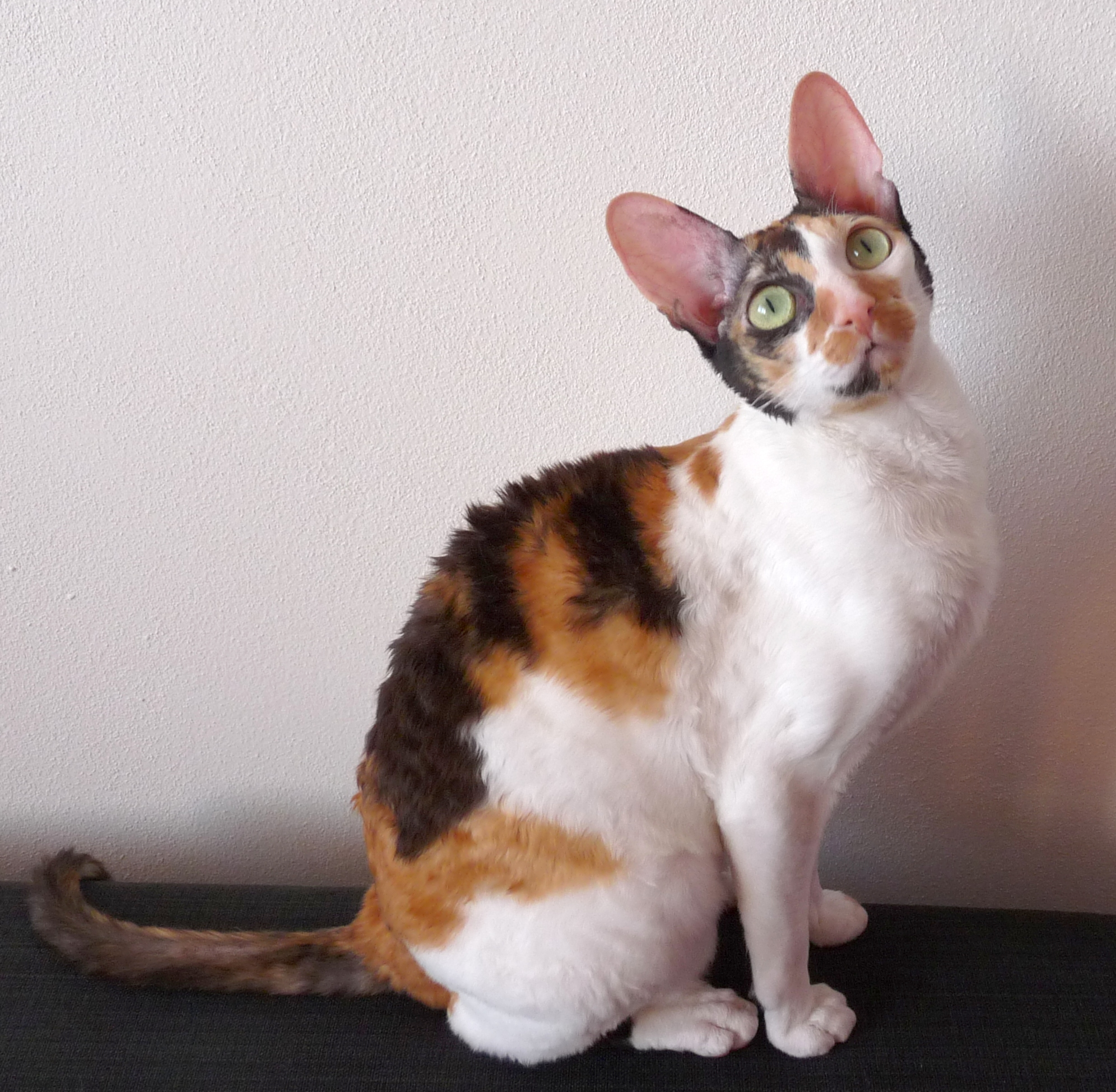 Cornish Rex